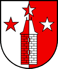 Wappen von Villarzel Kanton Waadt Schweiz